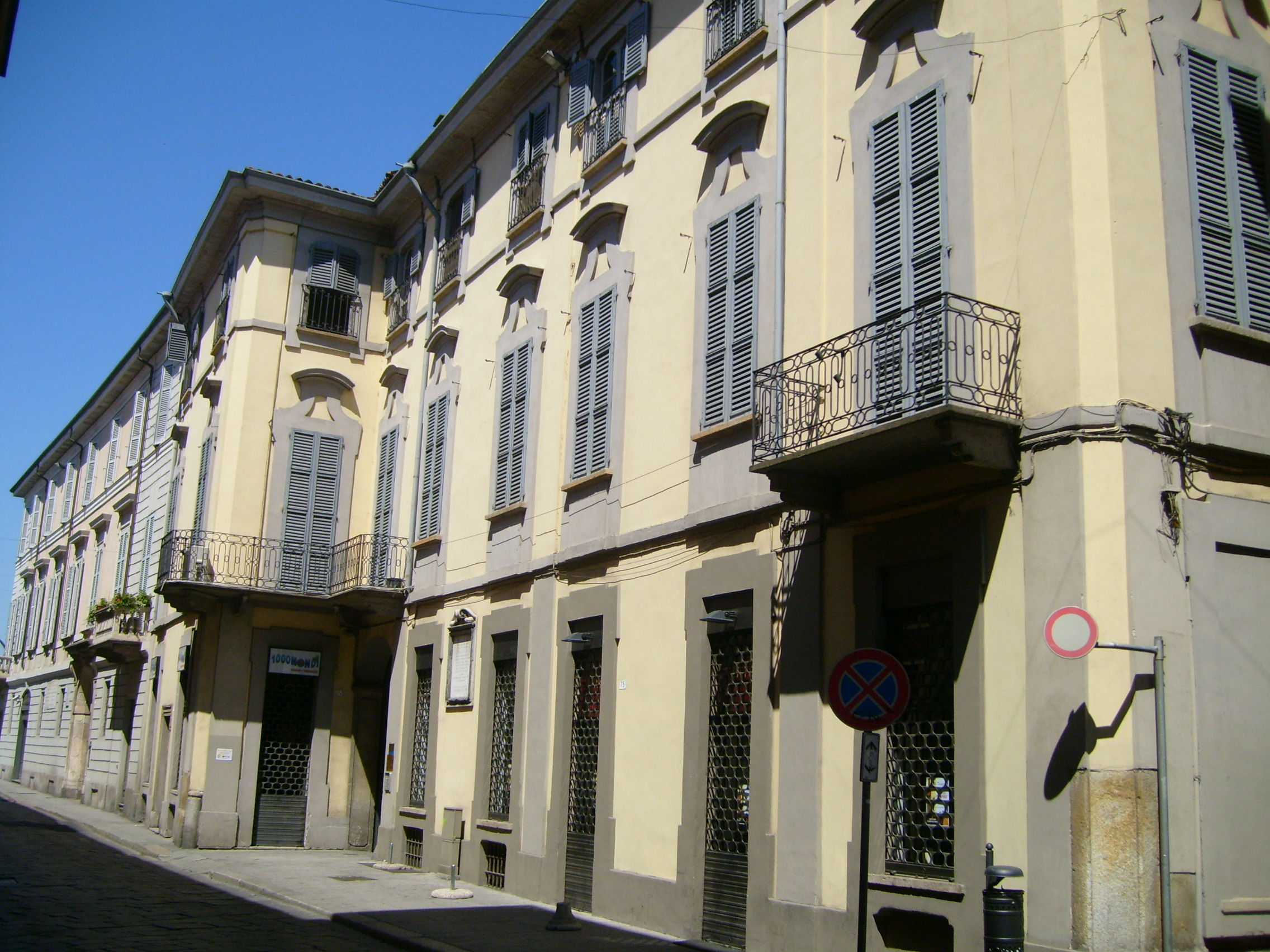 Camillo Golgi's home, Strada Nuova, Pavia, Italy